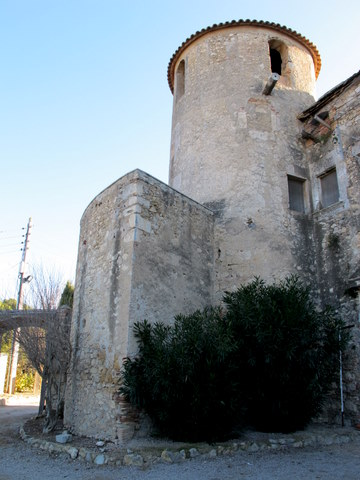 Castell de Penyafort a la comarca de l'Alt Penedès - Catalunya